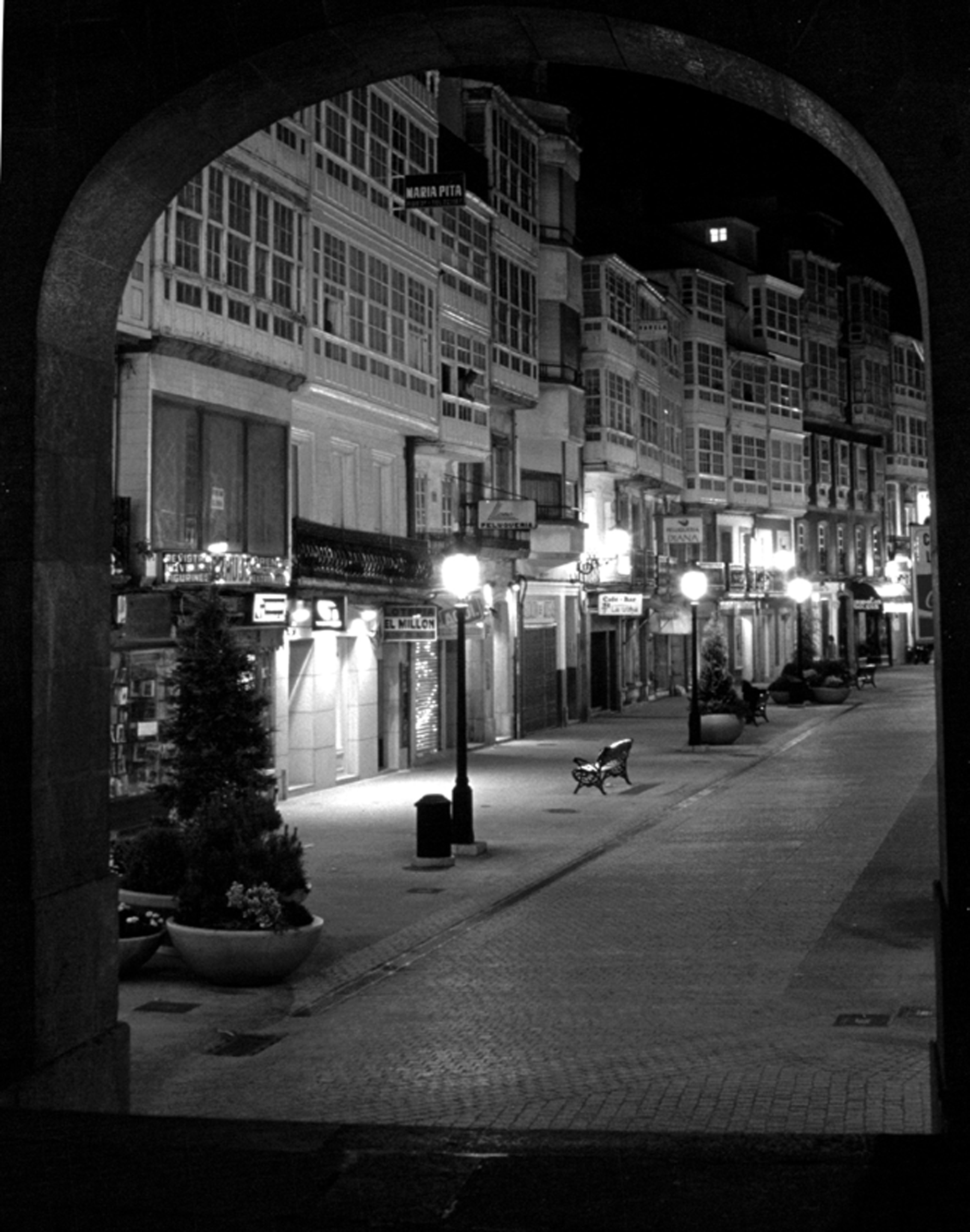 Riego de agua